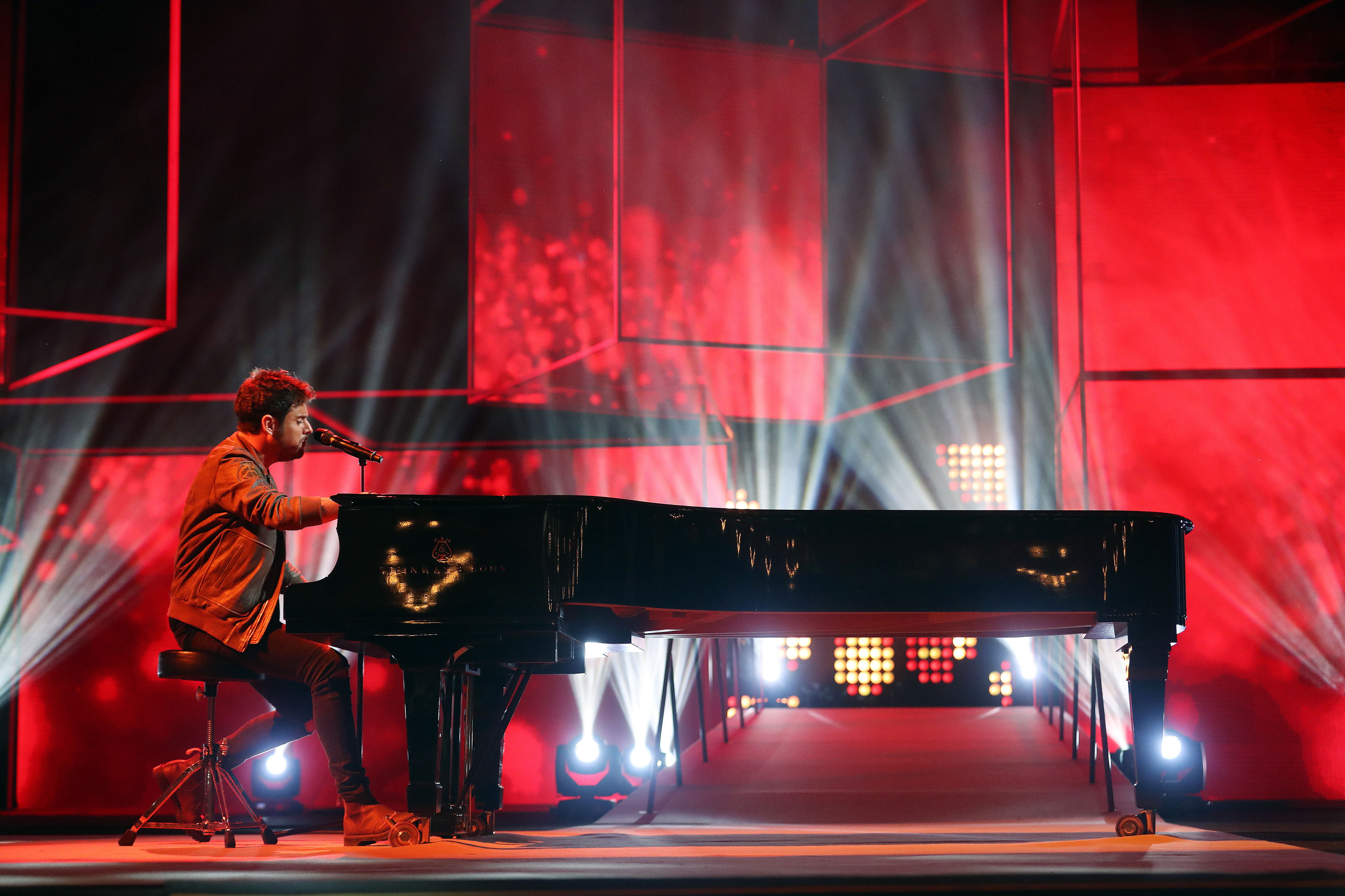 Pablo López cantando en directo "Tu Enemigo" y con piano en la Gala de entrega de los Premios Ondas 2016